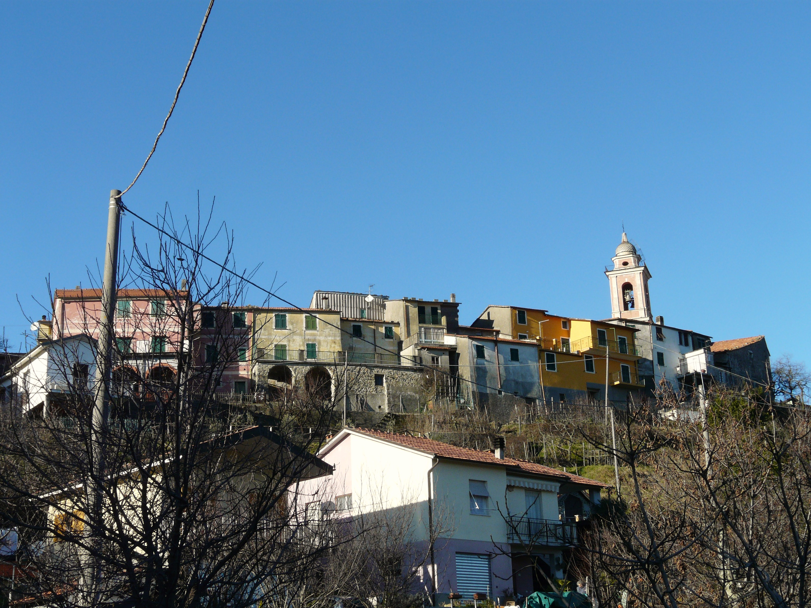 Panorama di Carrodano Superiore, Carrodano, Liguria, Italia